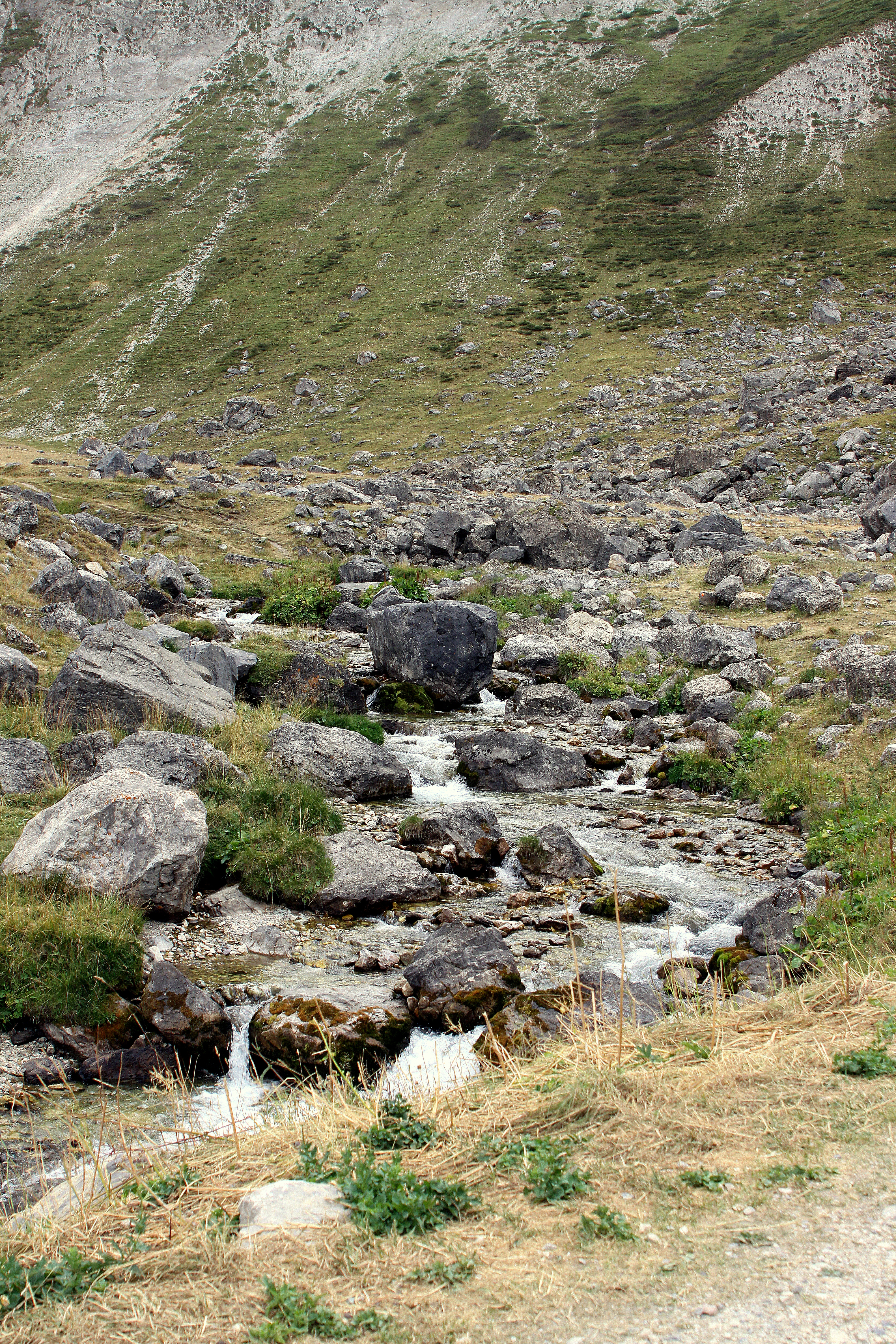 D'Valloirette am ieweschte Laf.